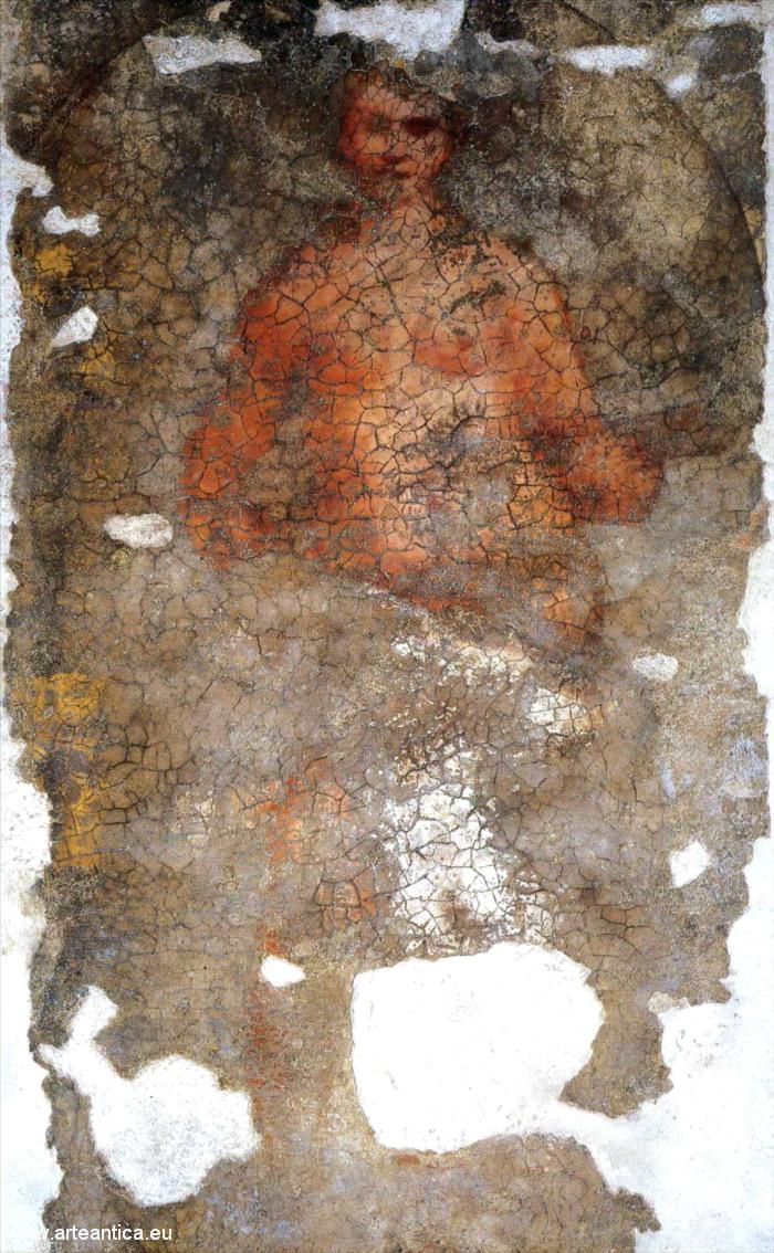 nuda